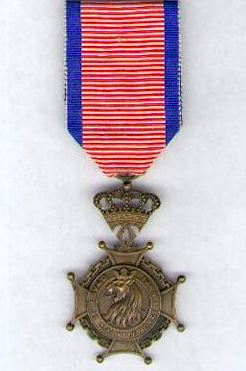 Croix de l'Ordre de la Résistance 1940–1944